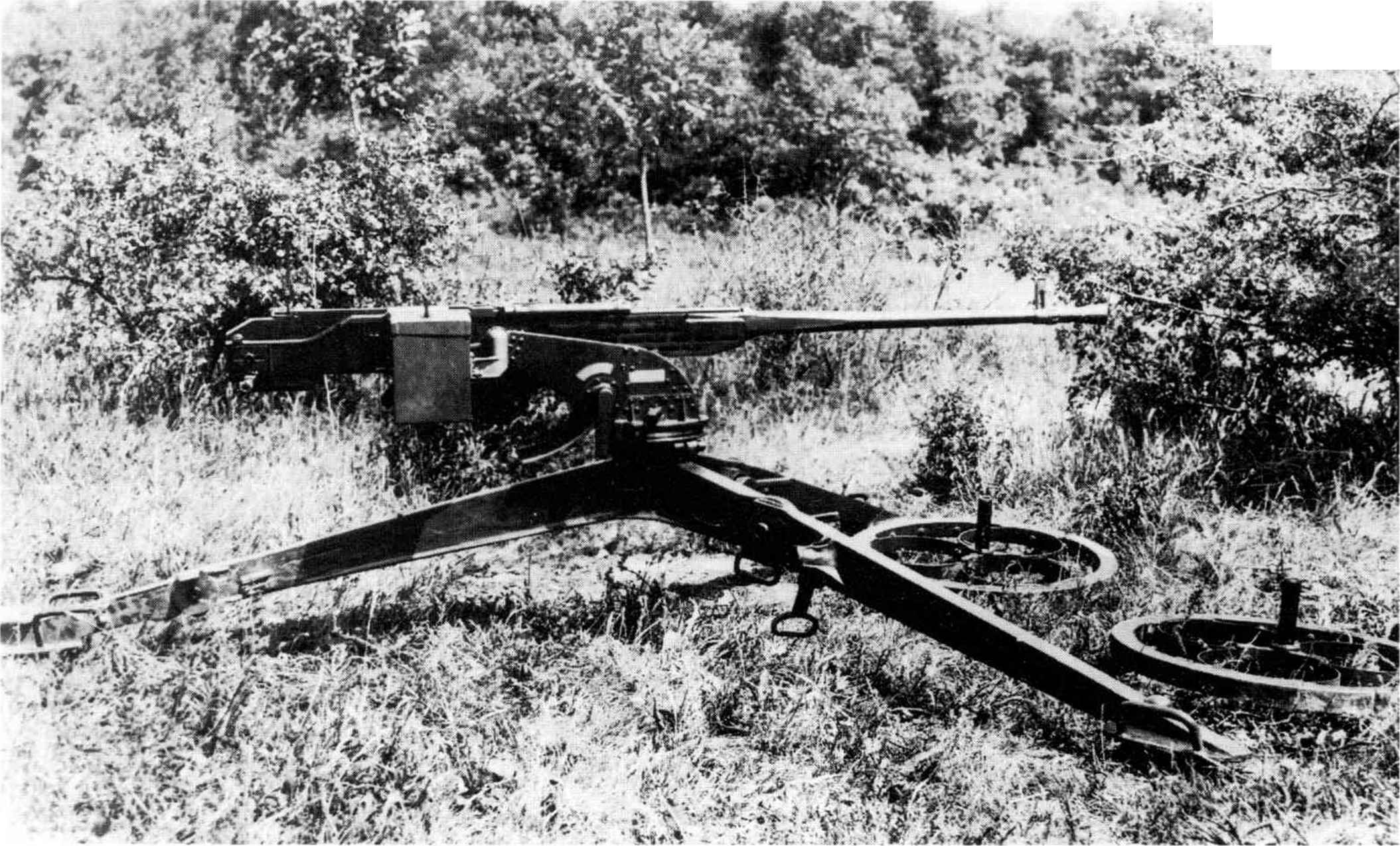 MLa mitragliatrice pesante ZB vz. 60 in posizione per il tiro teso su specifico affusto treppiede